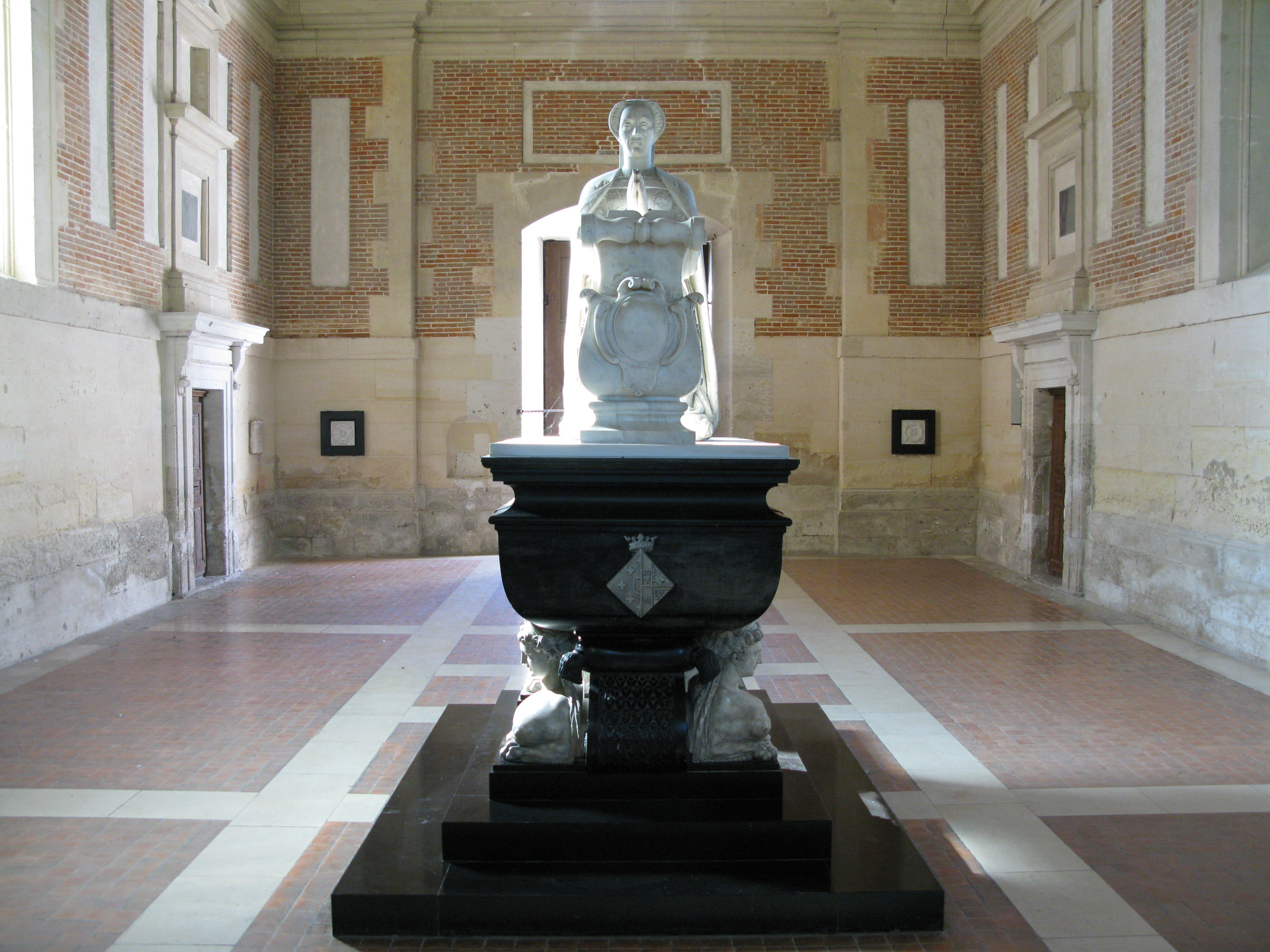 Le château d'Anet est un château Renaissance, situé en Eure-et-Loir, France Le château construit pour Diane de Poitiers par Philibert de l'Orme.